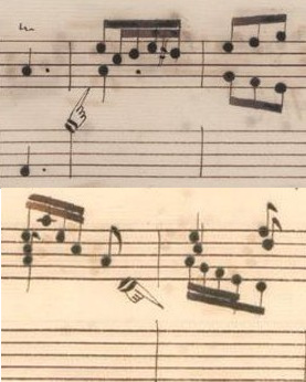 L'indication de changement de manuel est donné par de petites mains sur les manuscrits de Venise (haut) et Parme (en bas). Sonate K. 288, per organo da camera con due tastatura flautato è trombone.